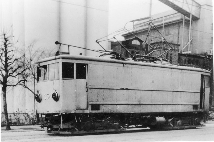 Oslo Sporveier. Trikk motorvogn type K nr. 354, "korntrikken" i lossesporet ved Bjølsen Valsemølle. Frontlykter med blending.